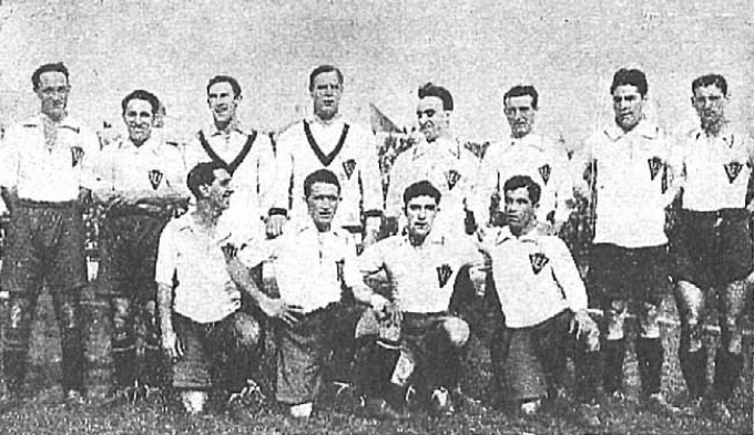 Selección española de fútbol que el 17 de marzo de 1929 derrotó a la de Portugal por cinco goles a cero en partido amistoso disputado en Sevilla. Jugaron Zamora, Quesada, Urquizu, Prast, Solé, Peña, Lazcano, Triana, Rubio, Padrón y Bosch. El seleccionador fue José María Mateos. Aparece también en la fotografía el portero suplente, Eizaguirre. Los jugadores visten la segunda equipación, ya que Portugal jugaba de rojo.